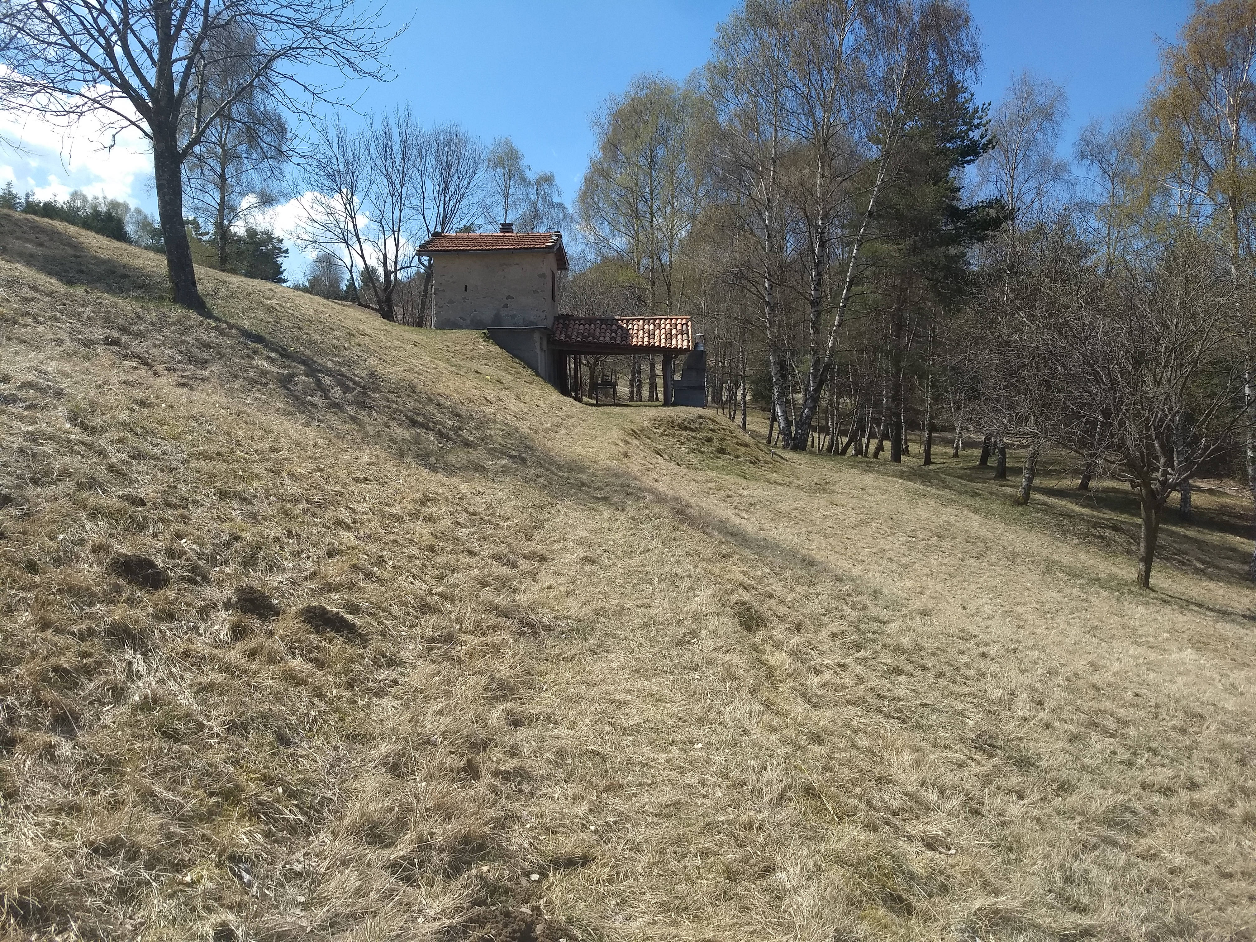 mulino di Armo in Valvestino